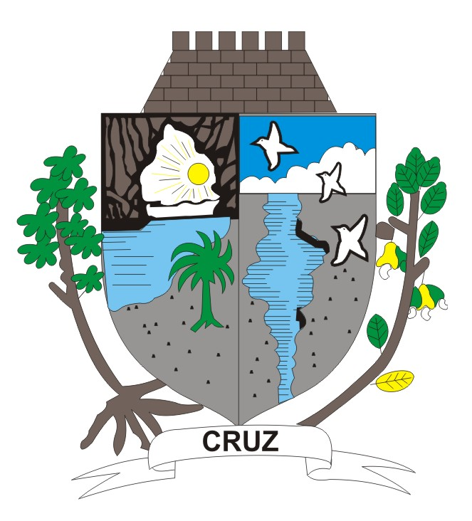 Brasão municipal de Cruz, Ceará, Brasil.Criação de: Manoel Valdery da Rocha.